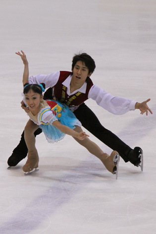 2009 Junior Grand Prix in Dresden (Pokal der Blauen Schwerter) - Sui Wenjing and Han Cong